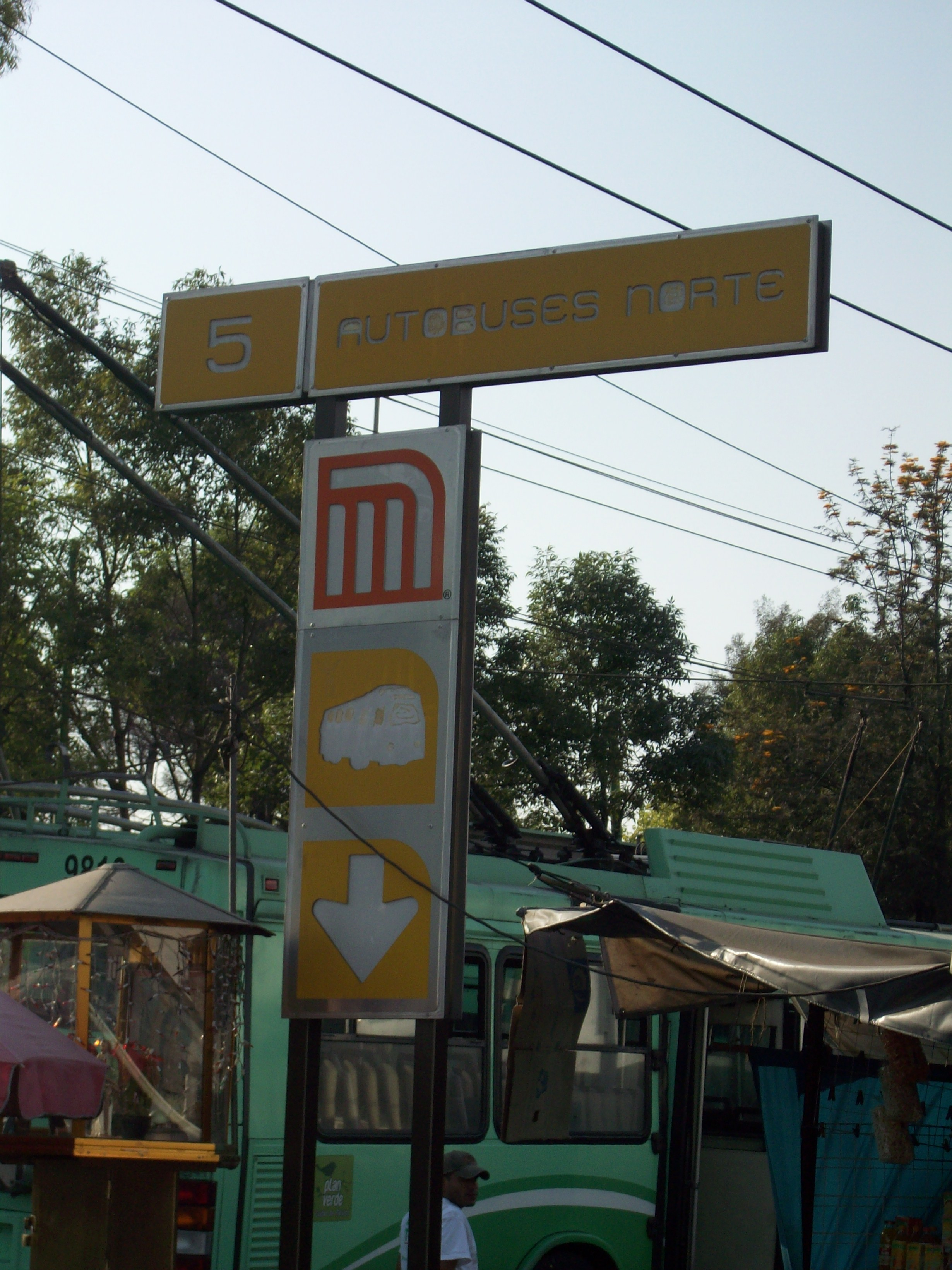 Letrero de estacion Autobuses del Norte